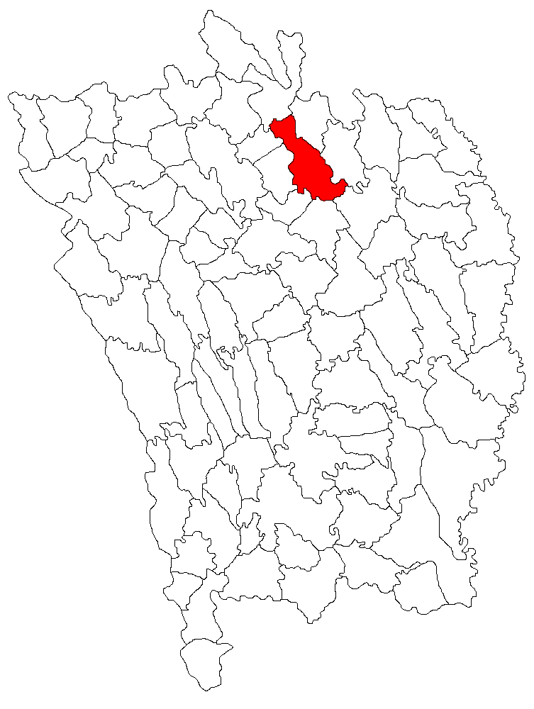 Categorie:Hărţi ale judeţului Vaslui